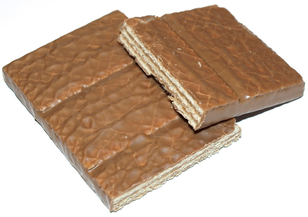 Weitere Informationen hier